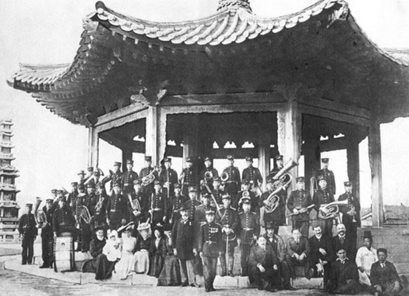 Франц Екерт в Кореї під час підготовки до демонстрації на честь дня народження Імператора Коджона (1901)